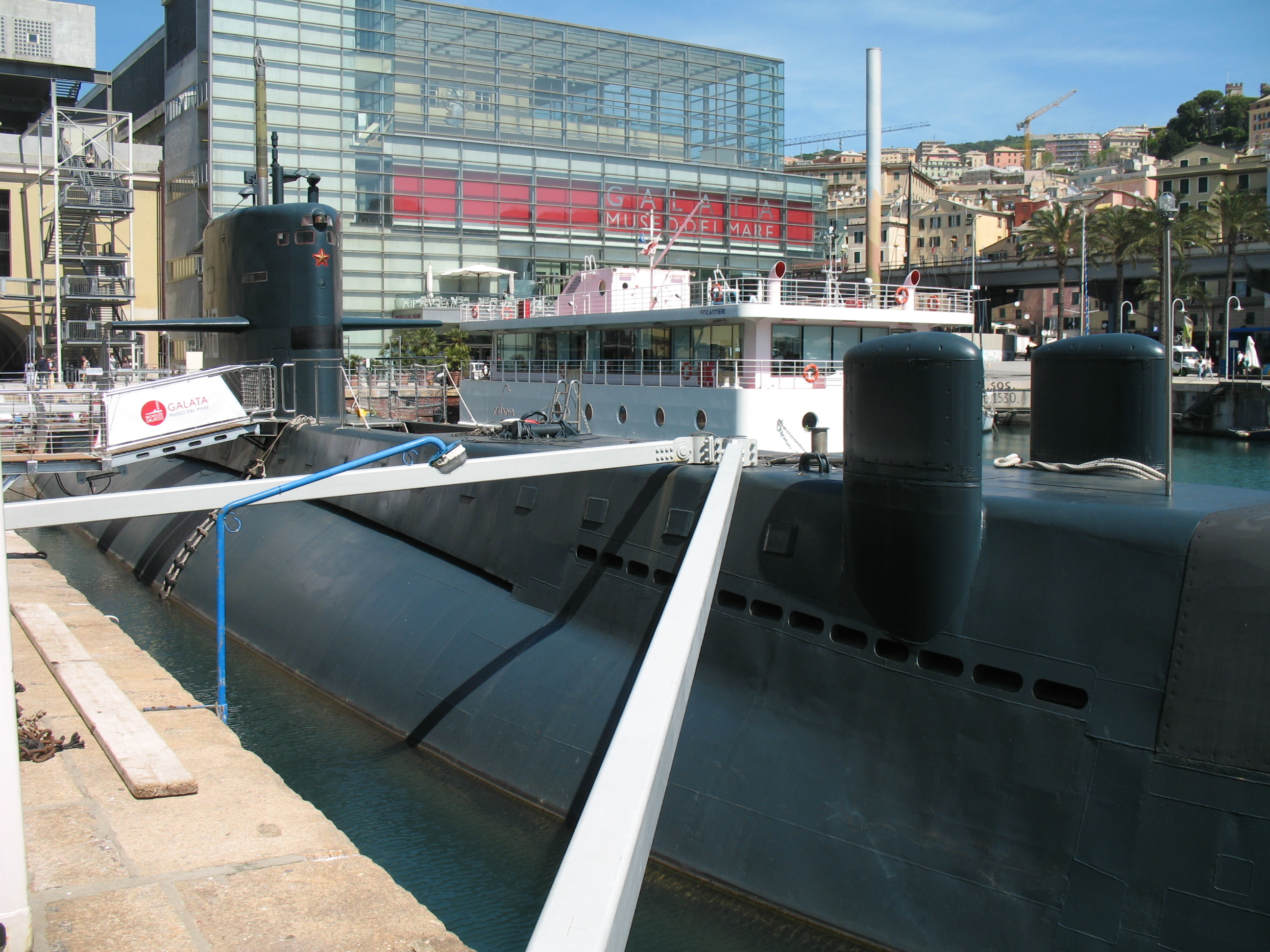 Veduta della darsena del porto antico di Genova, con il sommergibile Nazario Sauro S 518 e, sullo sfondo, l'edificio che ospita il Galata - Museo del Mare.